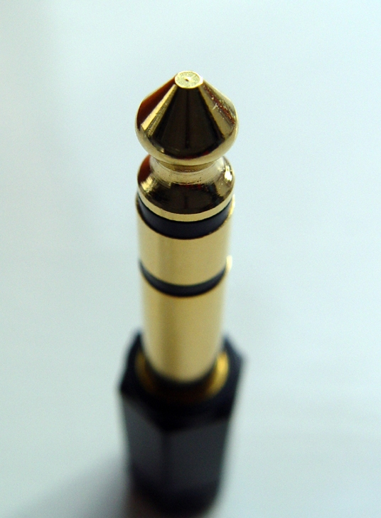 Audio Plug